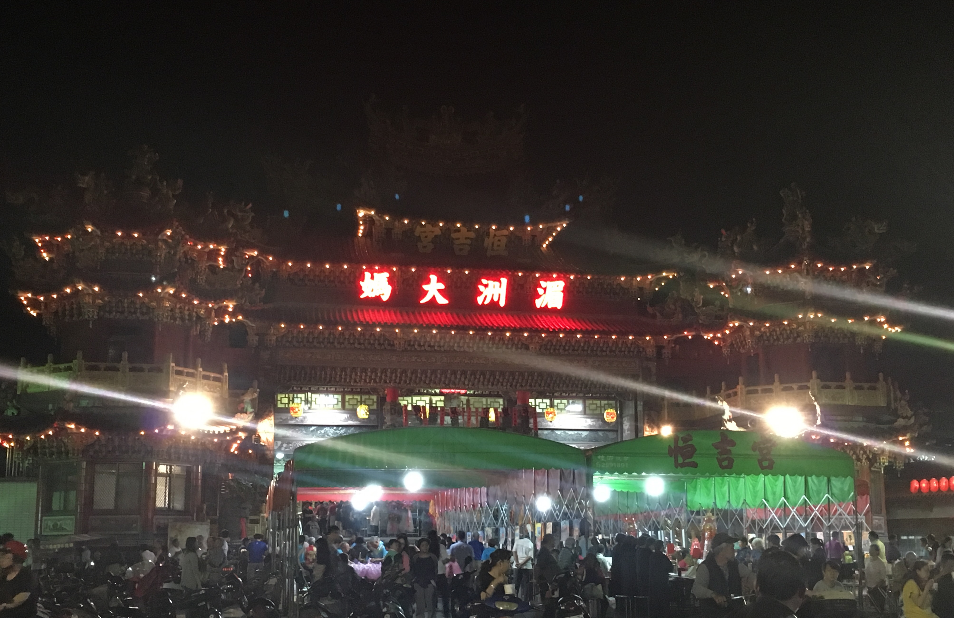 埔里恒吉宮廟景